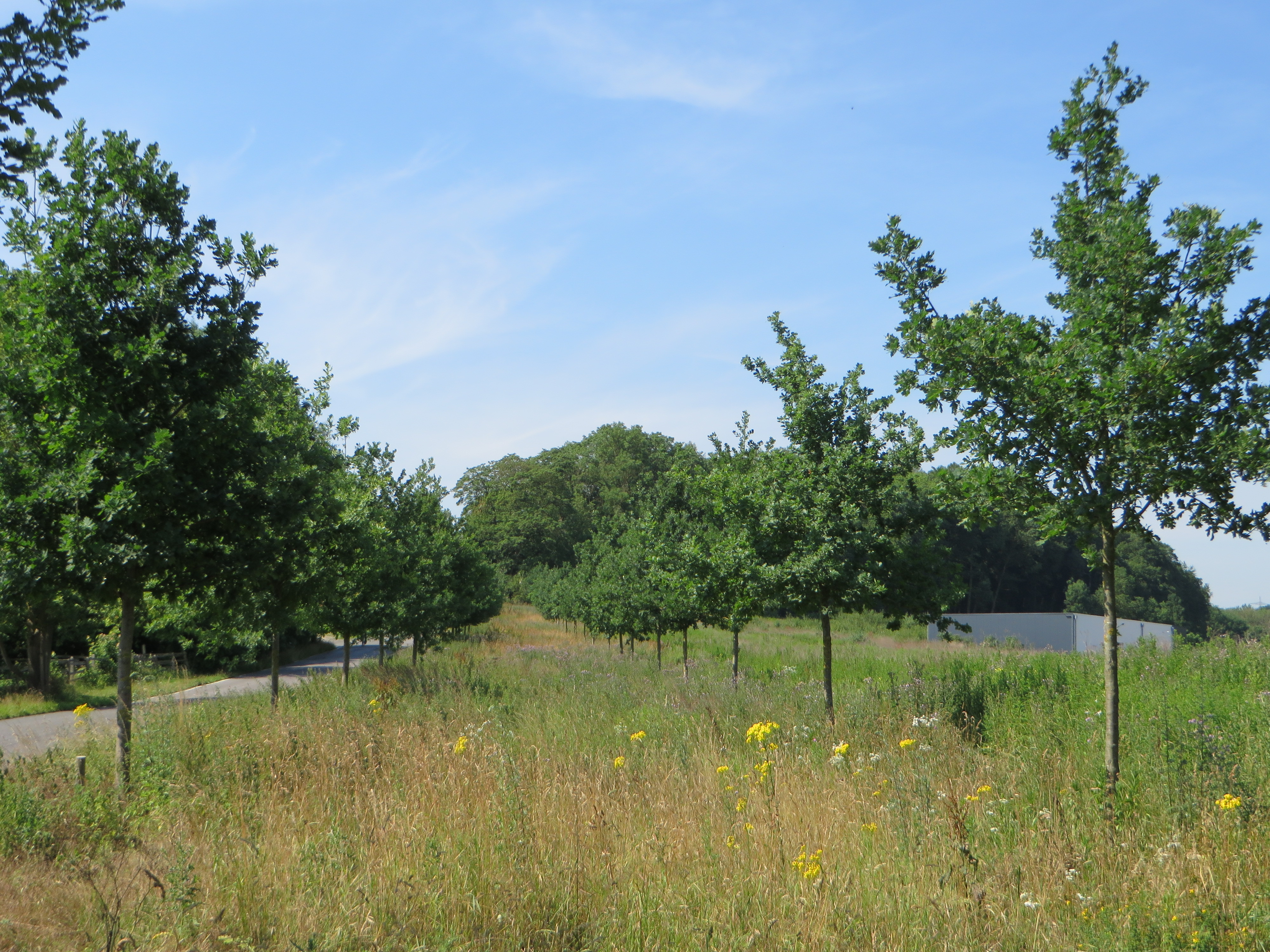 Geschützte Stiel-Eichenallee am Herbecker Weg bei Gut Herbeck in Hagen-Herbeck. Länge: 270 m (Alleenkataster NRW AL-HA-0002). Die ehemalige historische Berg-/Spitz-Ahornallee (80 Bäume) mußte im Februar 2012 aus Verkehrssicherungsgründen gefällt werden. Durch eine Spende der Van Eupen Stiftung konnte anschließend eine Ersatzpflanzung mit 51 Stiel-Eichen stattfinden.